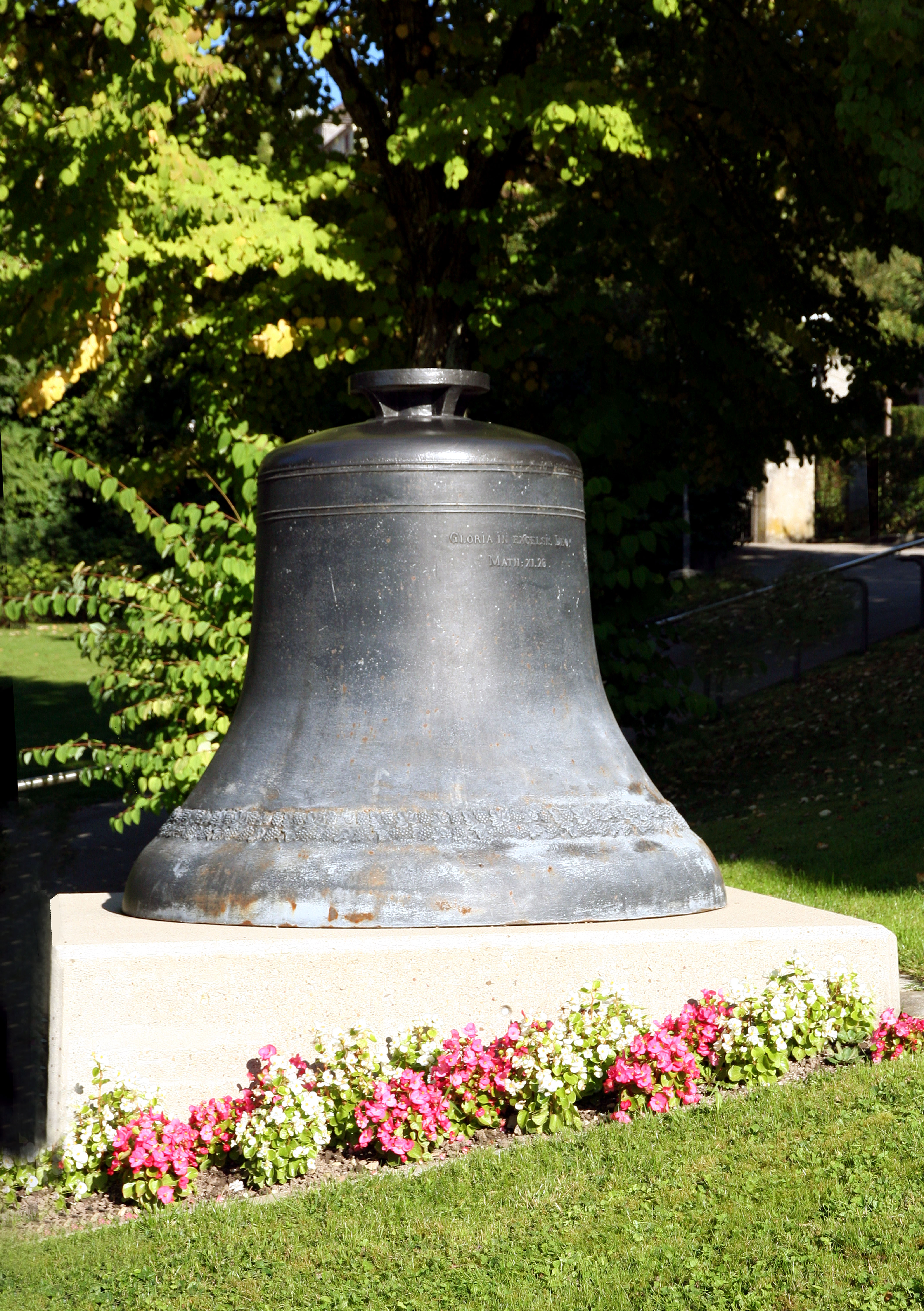 Römisch-katholische Kirche St. Gallus Lichtensteig